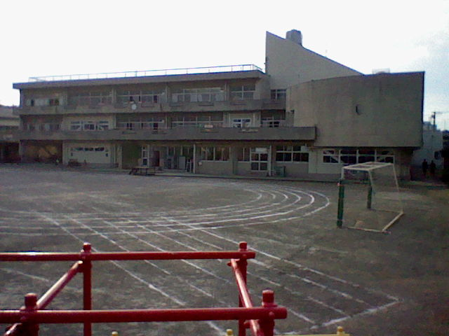 横浜市立斎藤分小学校の東校舎